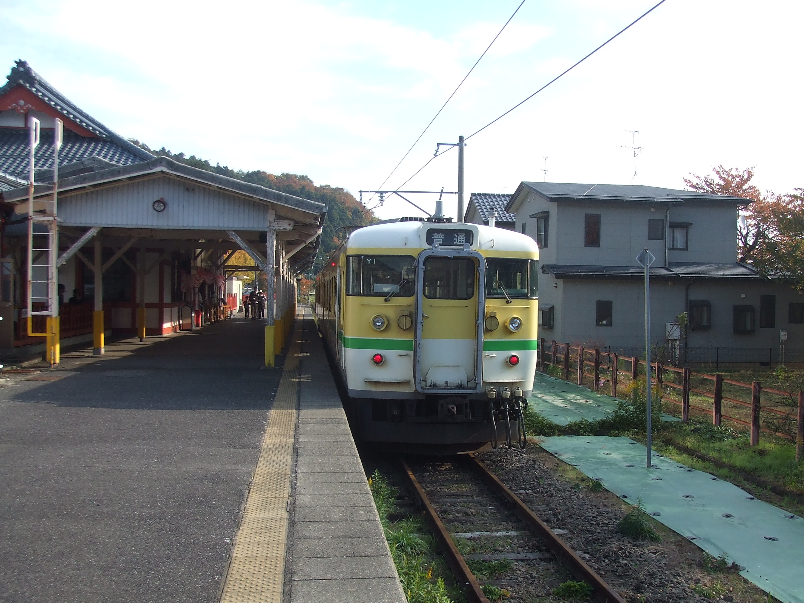 弥彦駅 駅構内